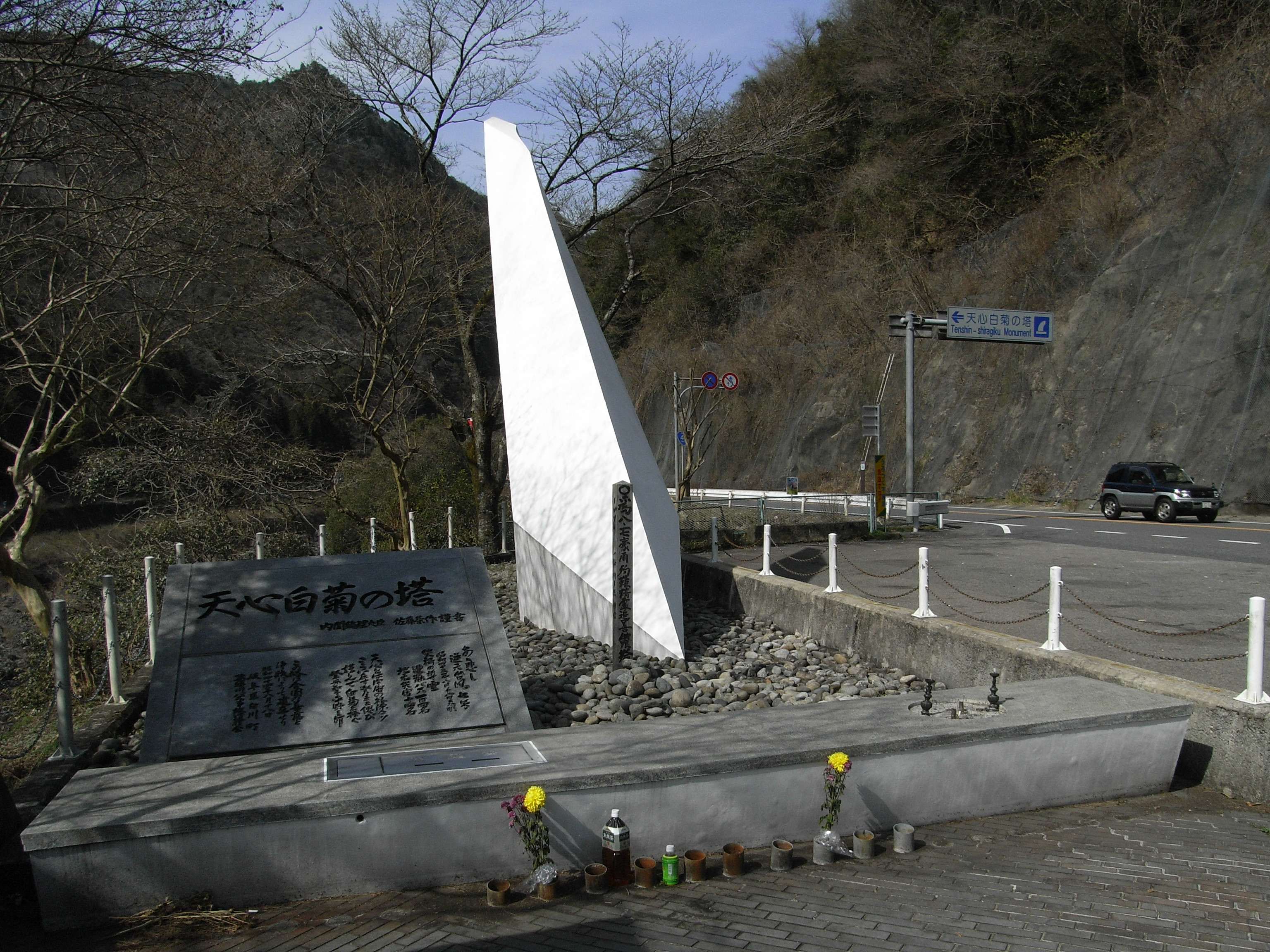 valley